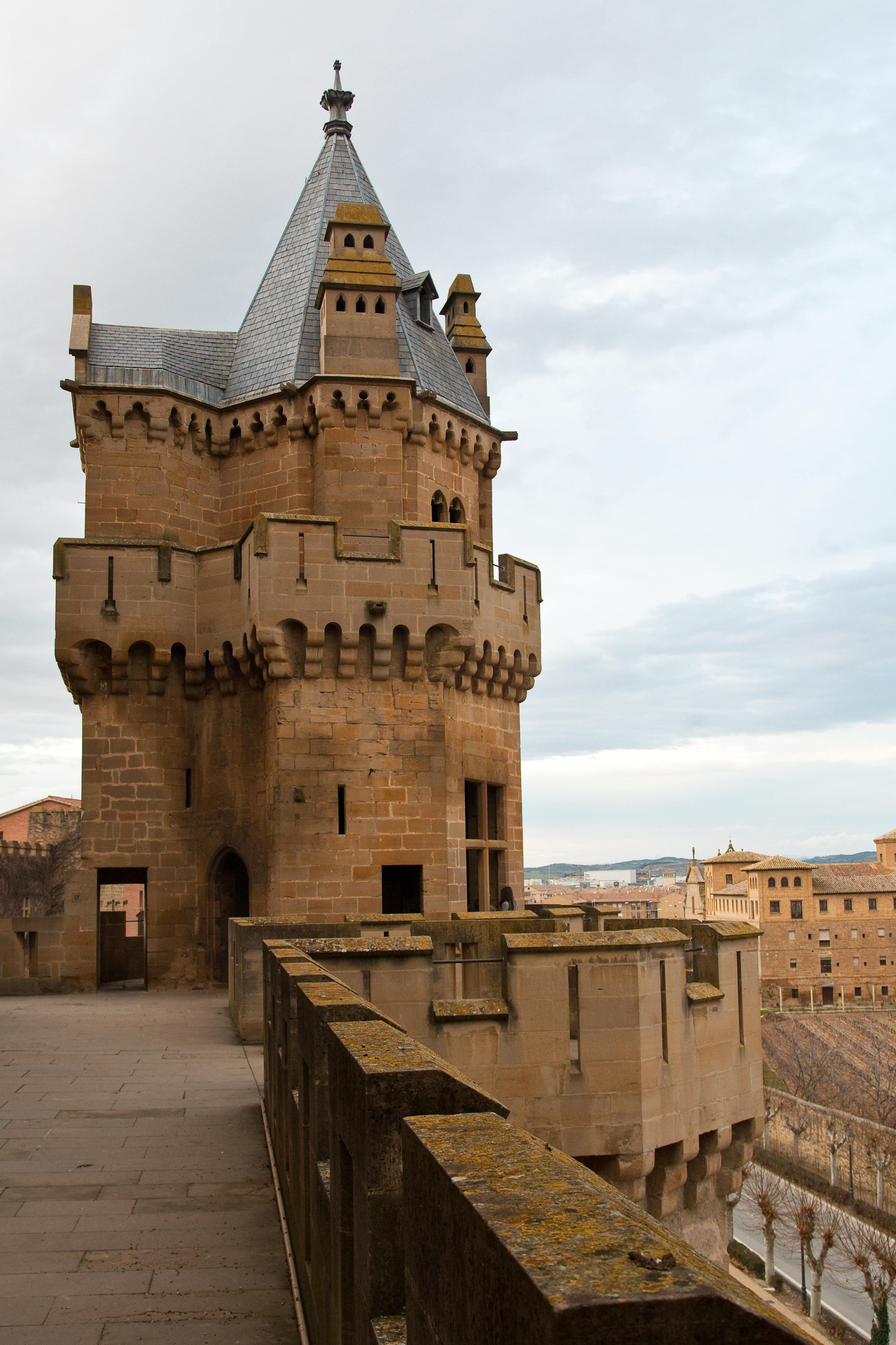 Castillo Palacio Real